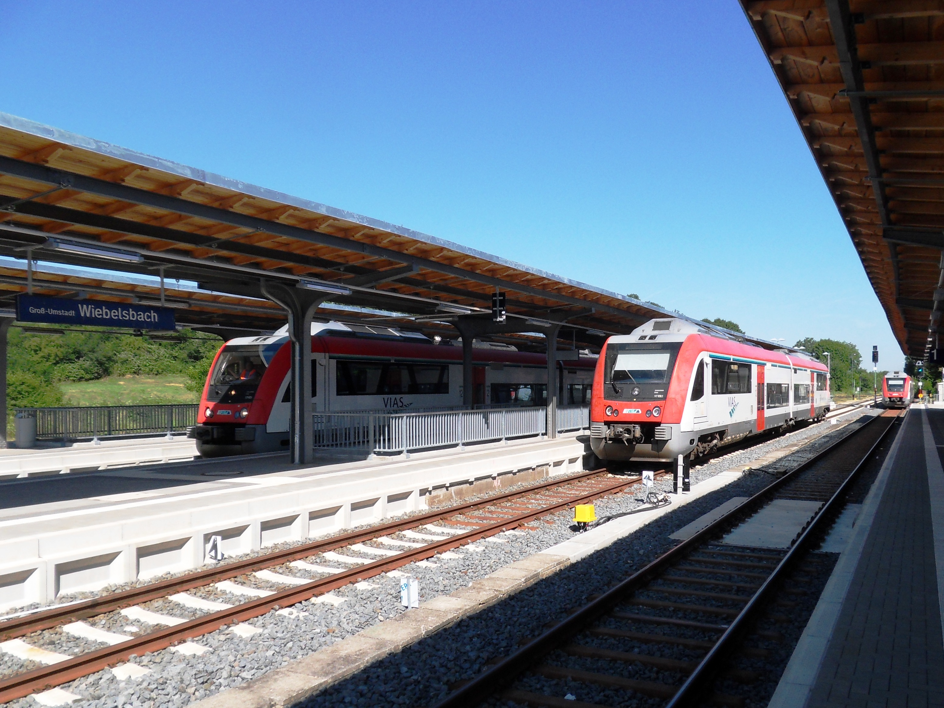 Die Bahnsteige des Bahnhofs Groß-Umstadt Wiebelsbach mit einem auf Gleis 1 Richtung Hanau ausfahrenden Itino